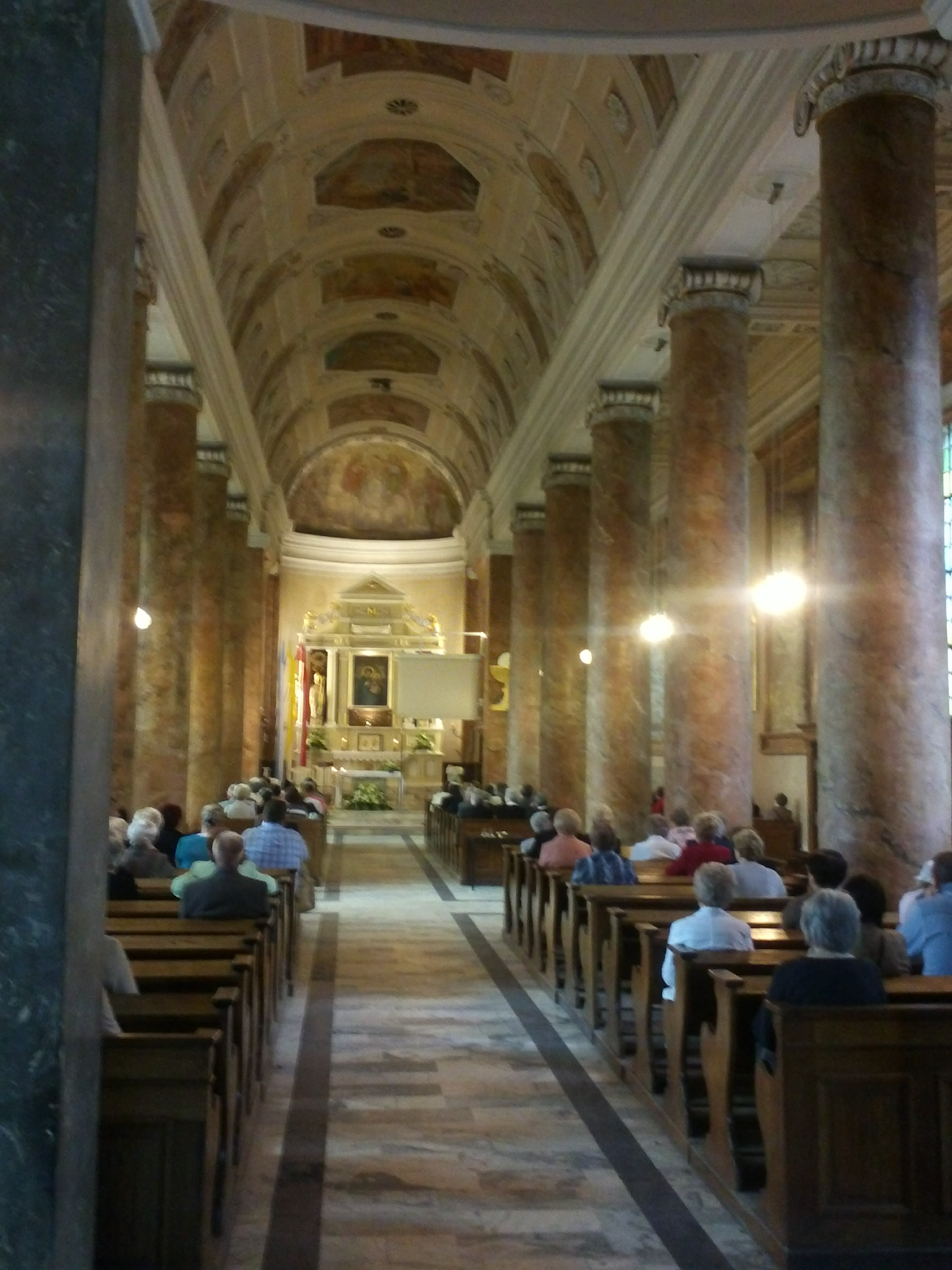 Kościół wzniesiono w stylu późnoklasycystycznym wg projektu Karla Fryderyka Schinkla w latach 1838-46. W roku 1945, po spaleniu świątyni przez Niemców, ocalały tylko mury obwodowe. Odbudowa trwała od 1946 do 1951 roku.